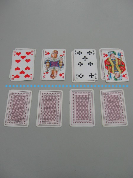 Offiziersskat, Situation während des Austeilens. Der Geber sitzt vorne, sein Gegner wählt den Trumpf.